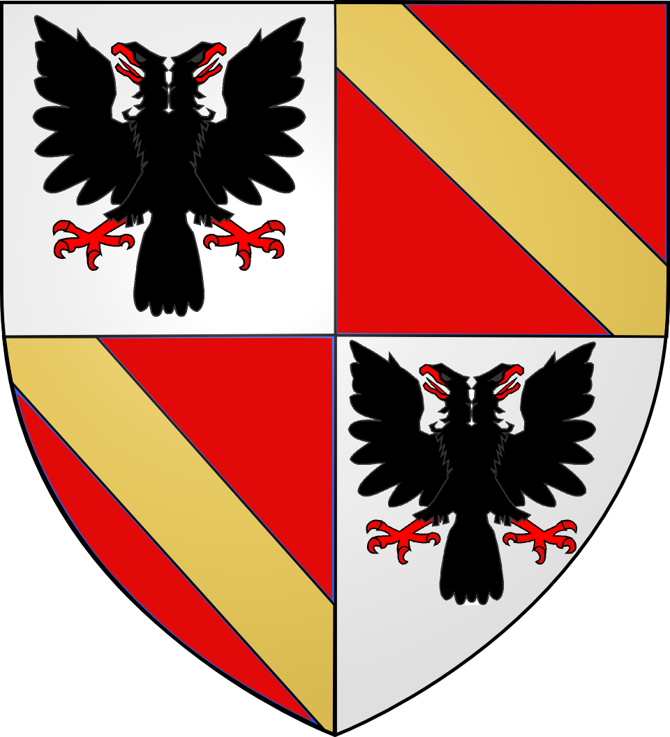 Blason de la famille de Gouy d'Arsy